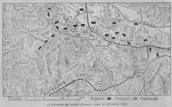 Avance maximale des Alliés lors du déploiement de 1915, de Démir Kapour à Strouitsa. Macédoine, 1915.